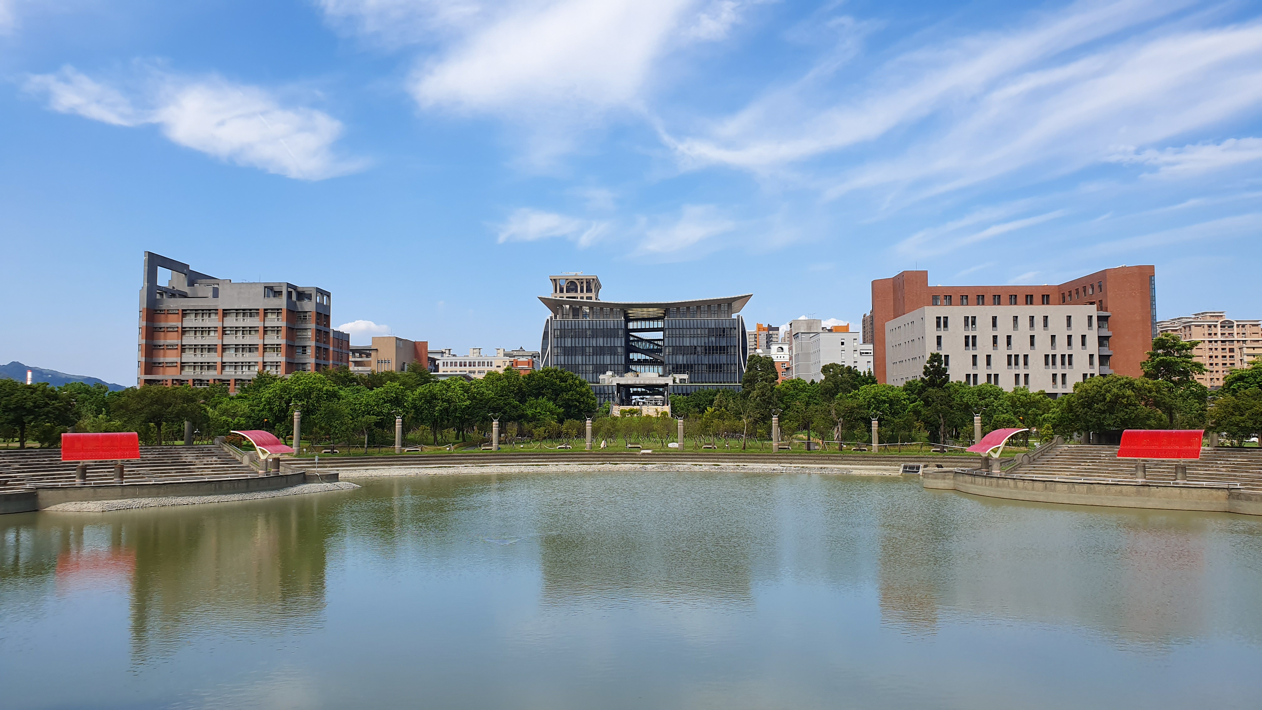 中文（台灣）: NTPU 心湖及表演區2019年8月版